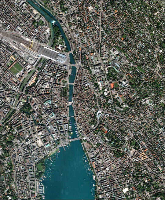 Image satellite de la ville de Zurich. NASA, prise de 16 août 2002